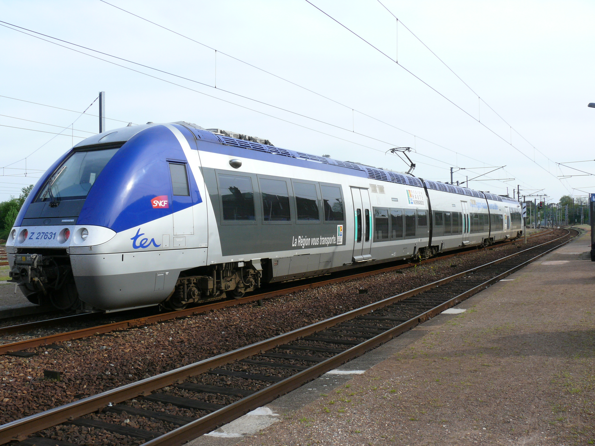 Automotrice tri-caisses de Bombardier Z 27632 (série Z 27500) de la région Haute Normandie, en gare de Serqueux